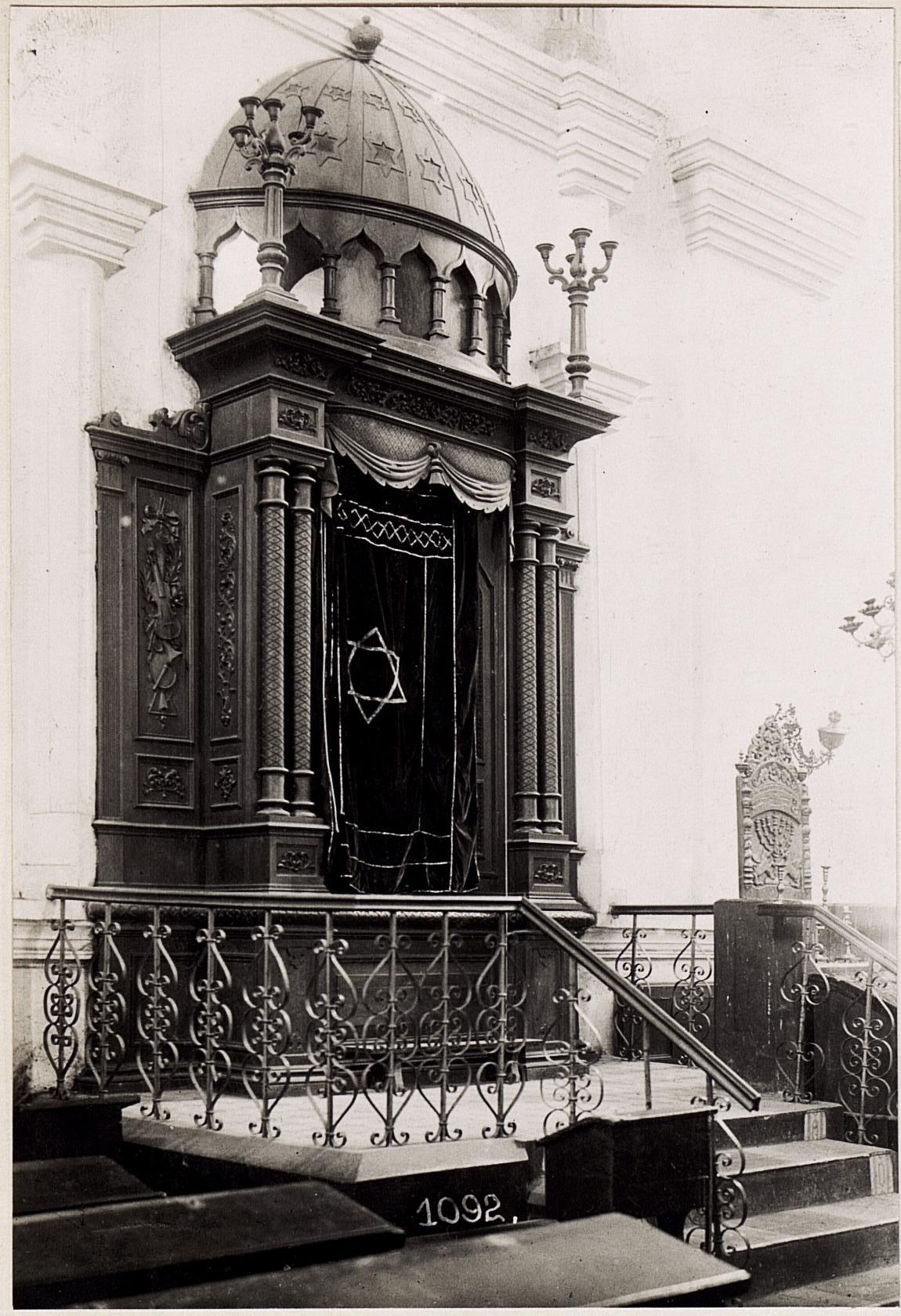 Интерьер Большой синагоги в Людмире (Владимире-Волынском).